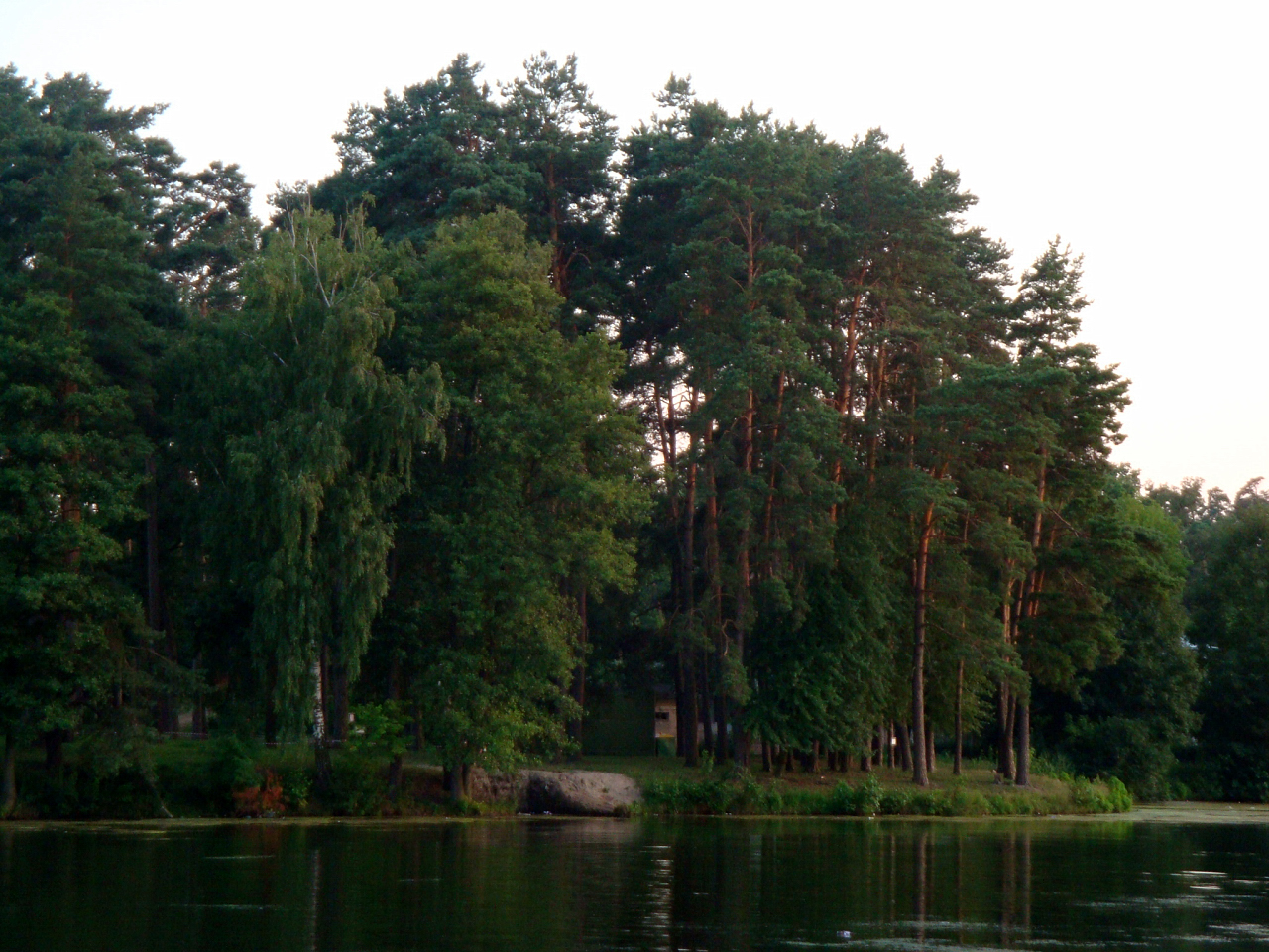 Велике озеро у Ворзелі